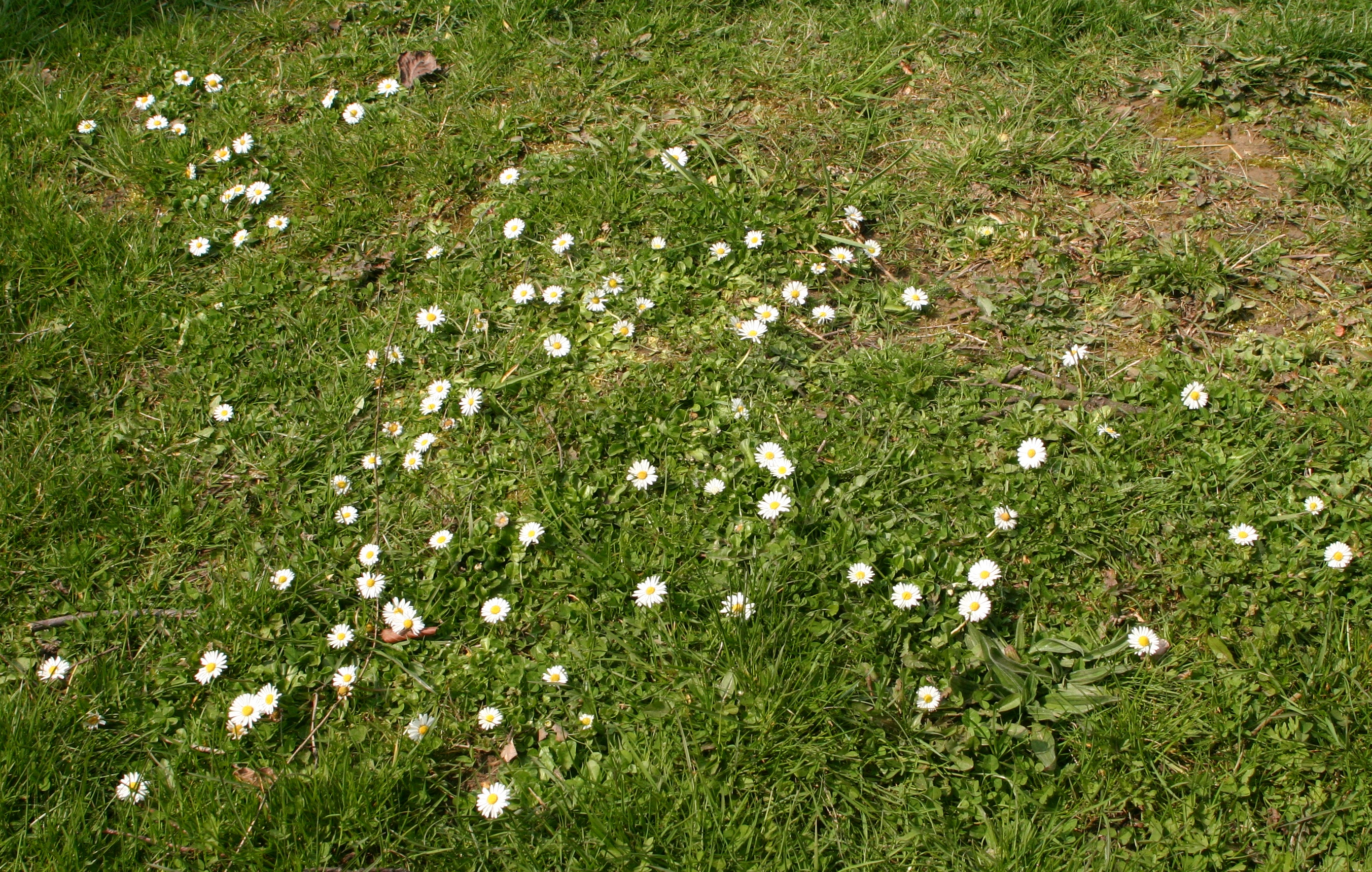 Margréidercher op enger Wiss.